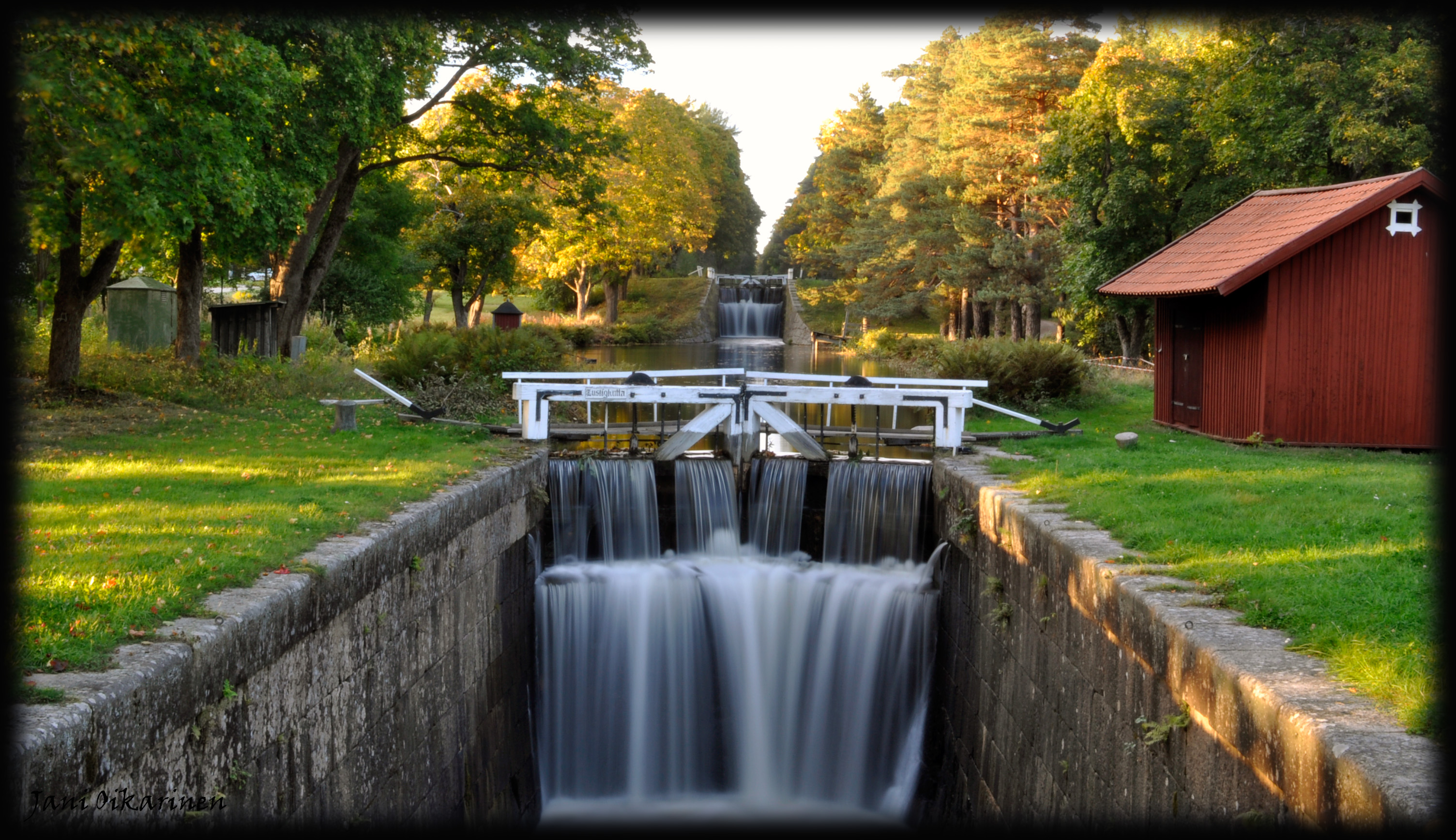 Strömsholms Kanal , Lustigkulla slussarna